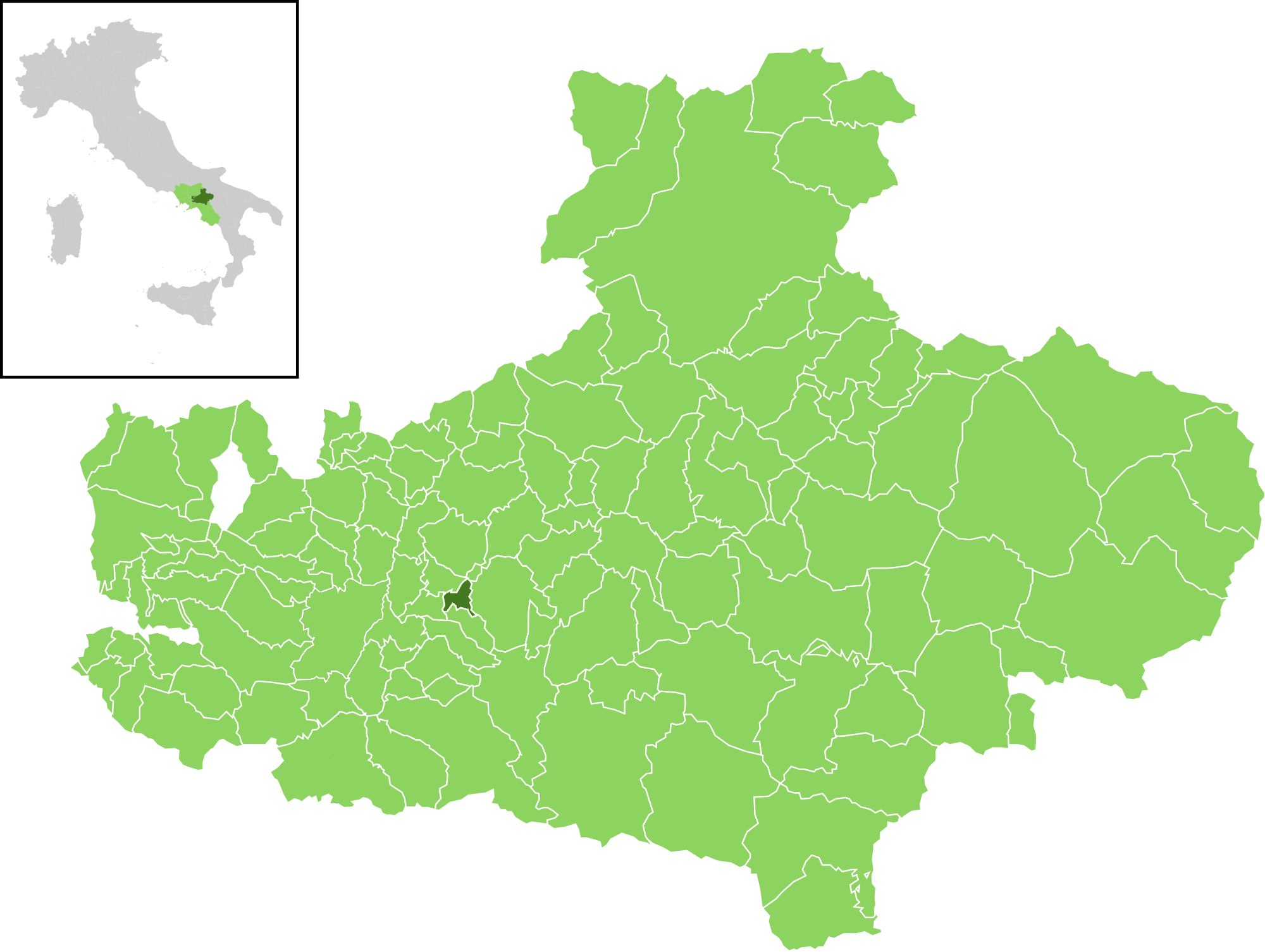 Posizione del comune all'interno della provincia di Avellino